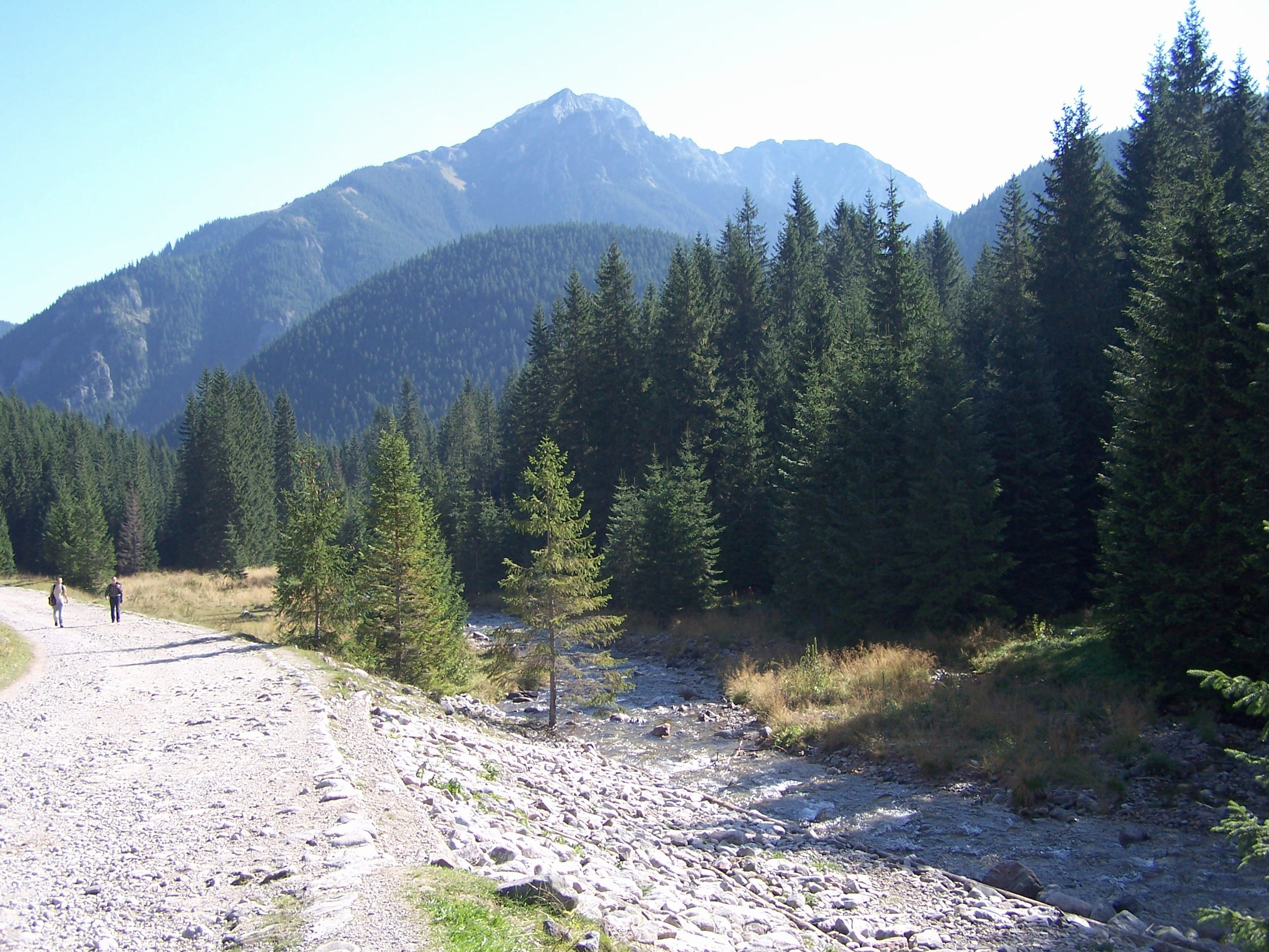 Mnichy Chochołowskie (Dolina Chochołowska)